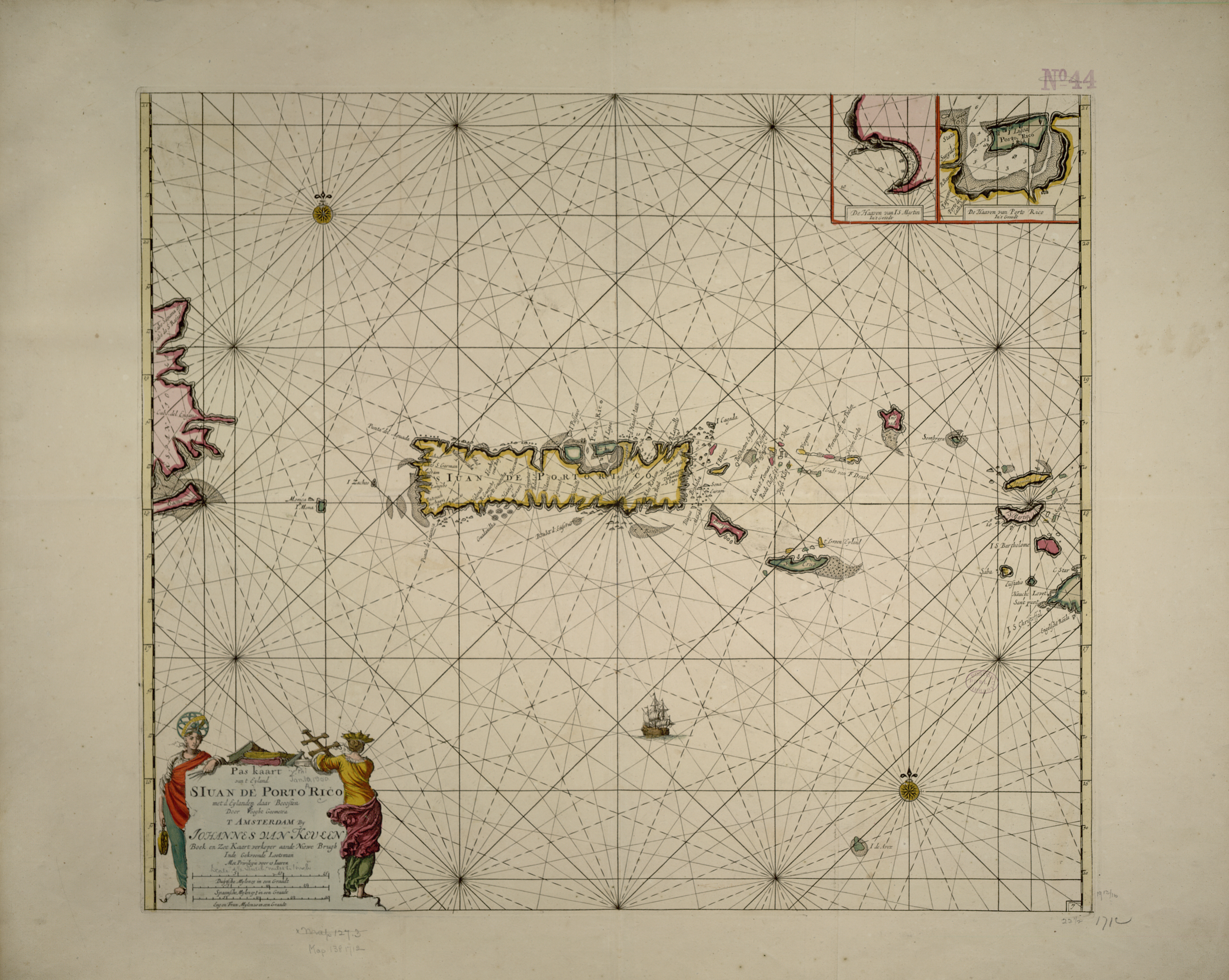 Pas kaart van t'eyland S. Iuan de Porto Rico